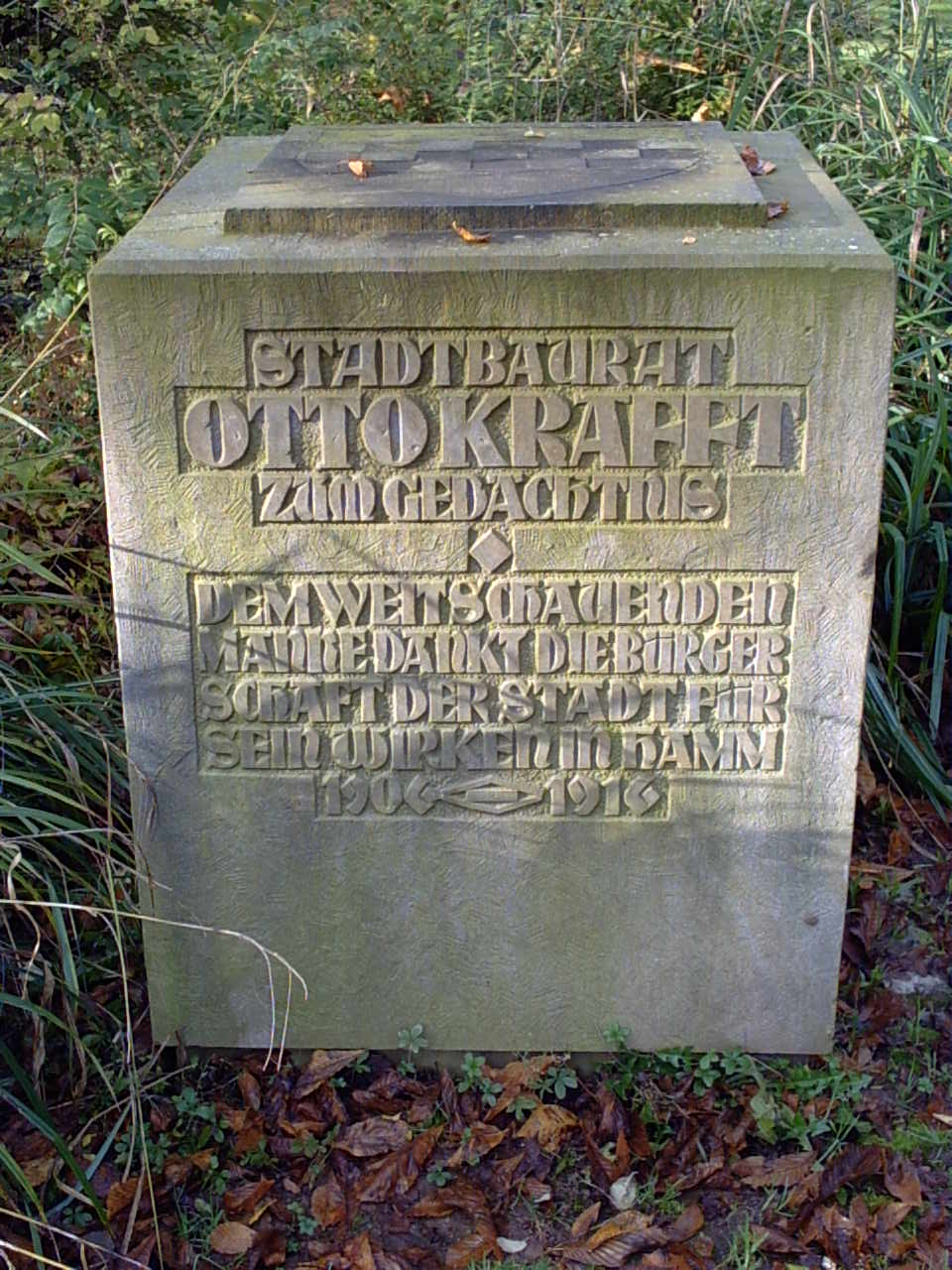 Gedenkstein für den Stadtbaurat Otto Krafft in Hamm/Westfalen